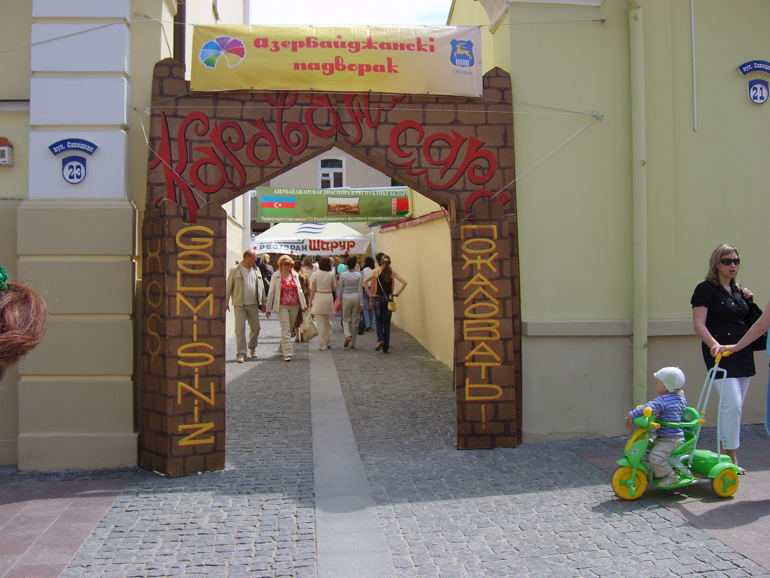 Республиканский фестиваль национальных культур (2010)